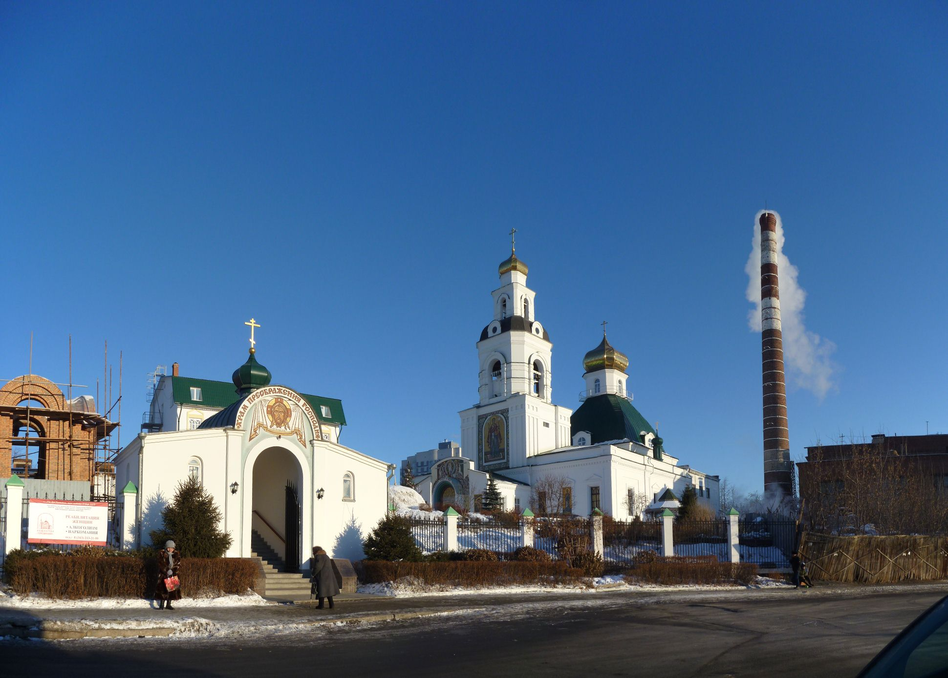 Преображенский храм